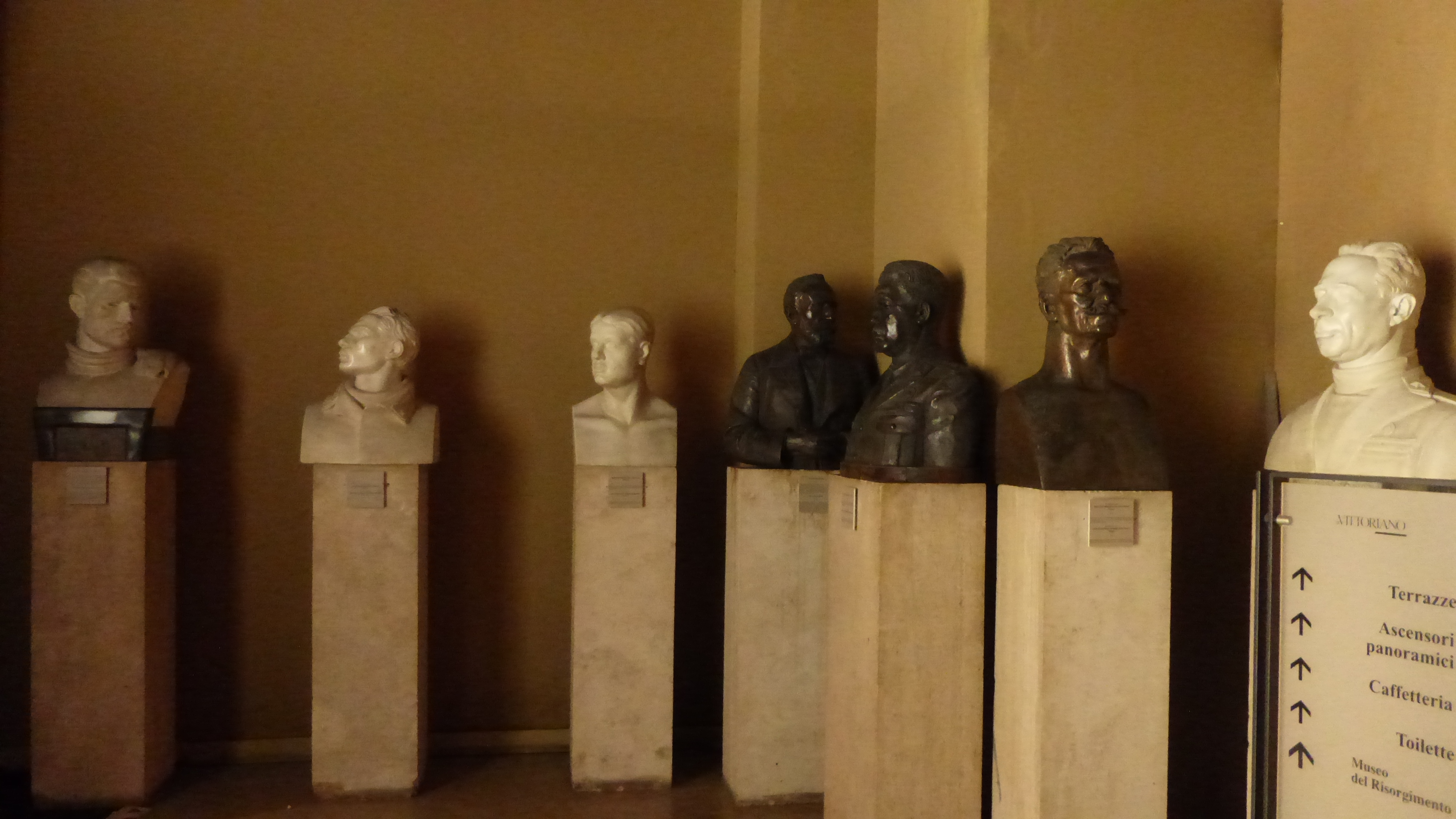 Roma, Museo centrale del Risorgimento. see filename.